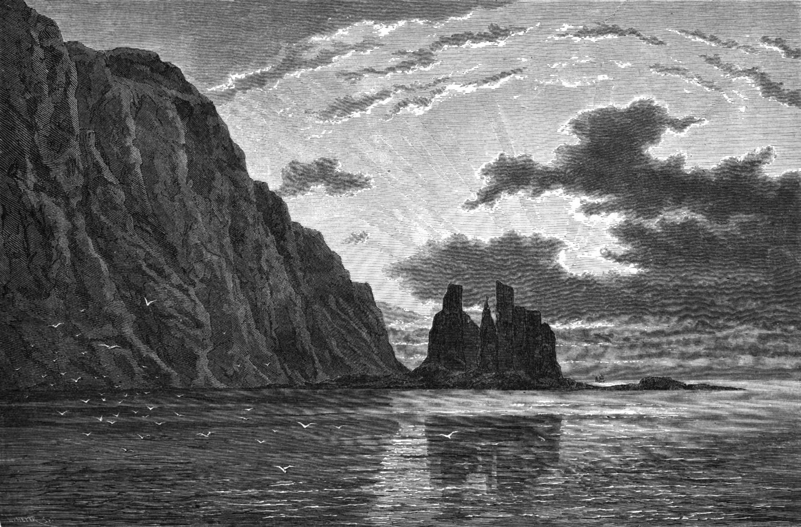 Finnkirka vid Kjøllefjord i Nordnorge.